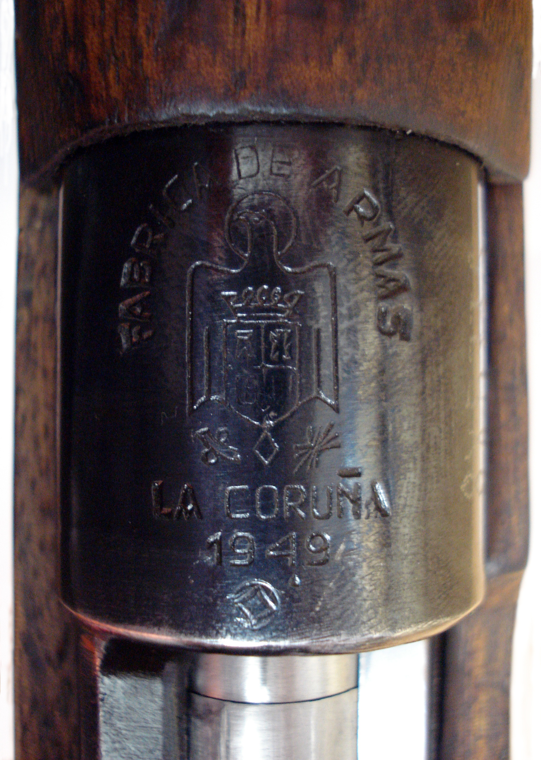 Receiver of a Spanish M43 Mauser